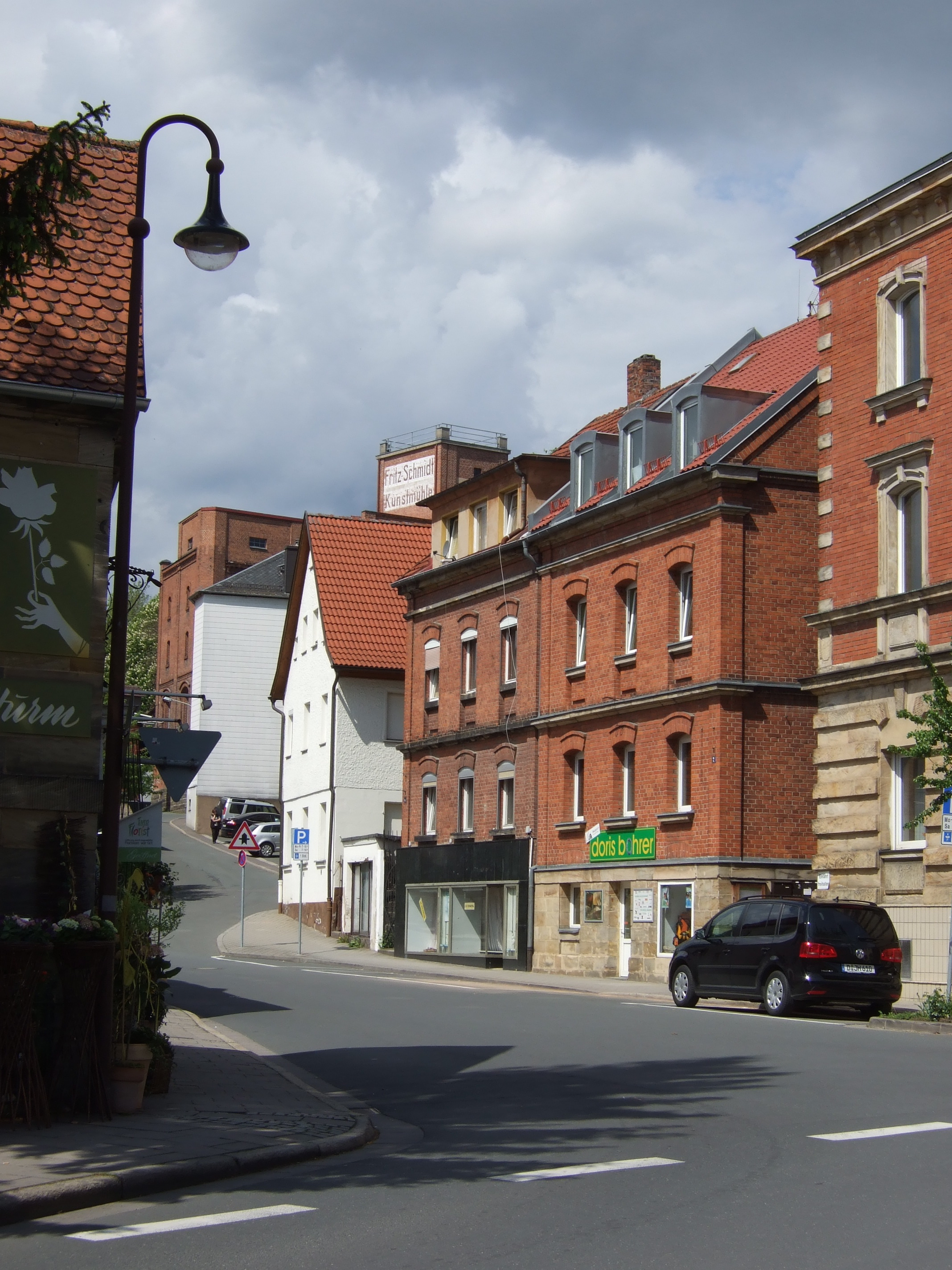 Untere Straße Kreuz Bayreuth